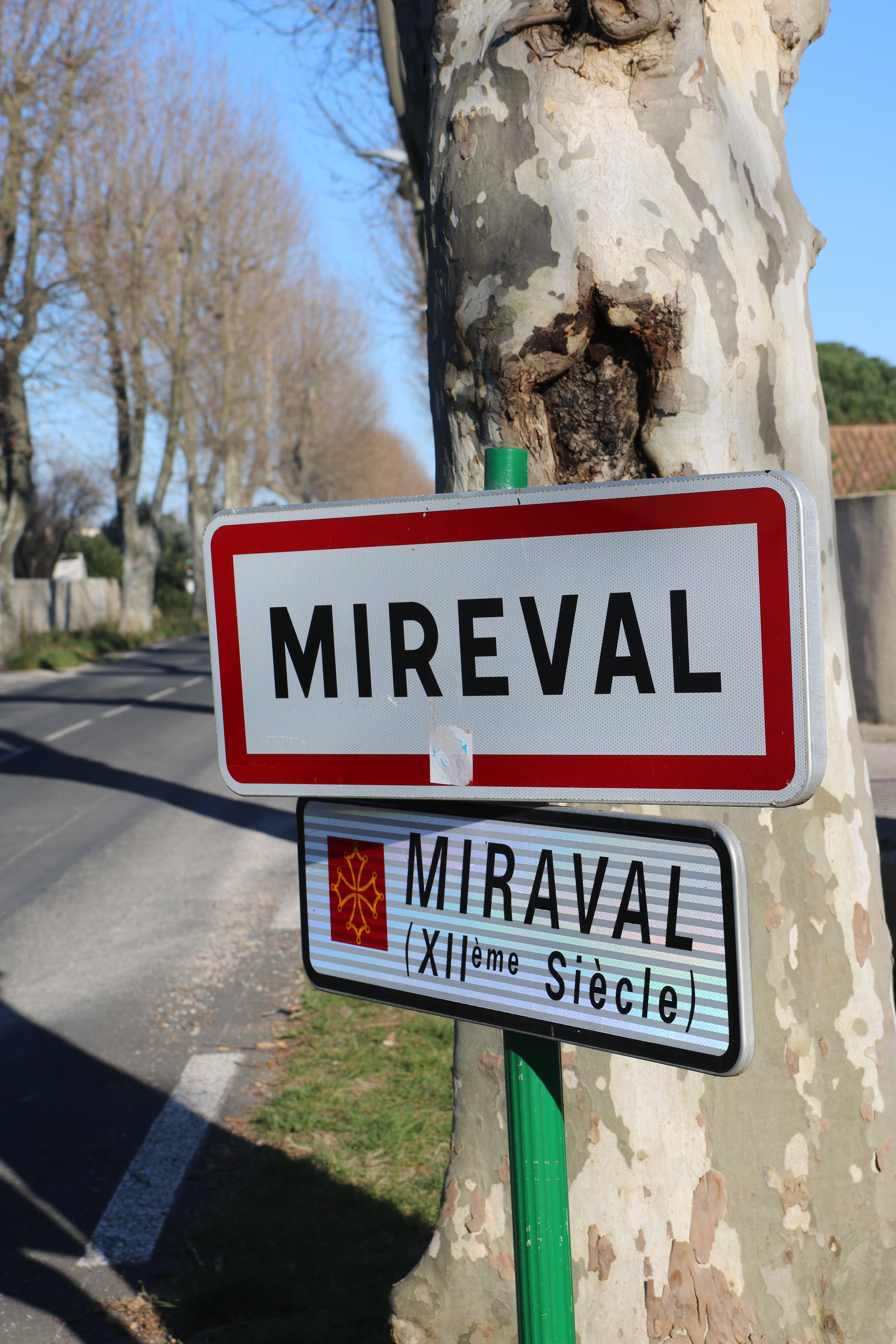 Mireval (Hérault) - panneau d'entrée bilingue (français-occitan) Mireval/Miraval